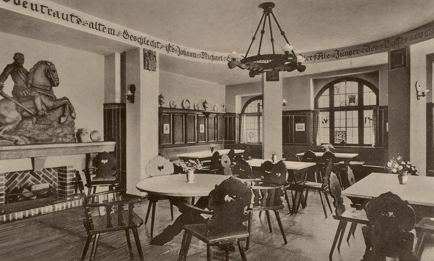 Kurhaus Stromberg 1950er Jahre Deutsche-Michel-Stube